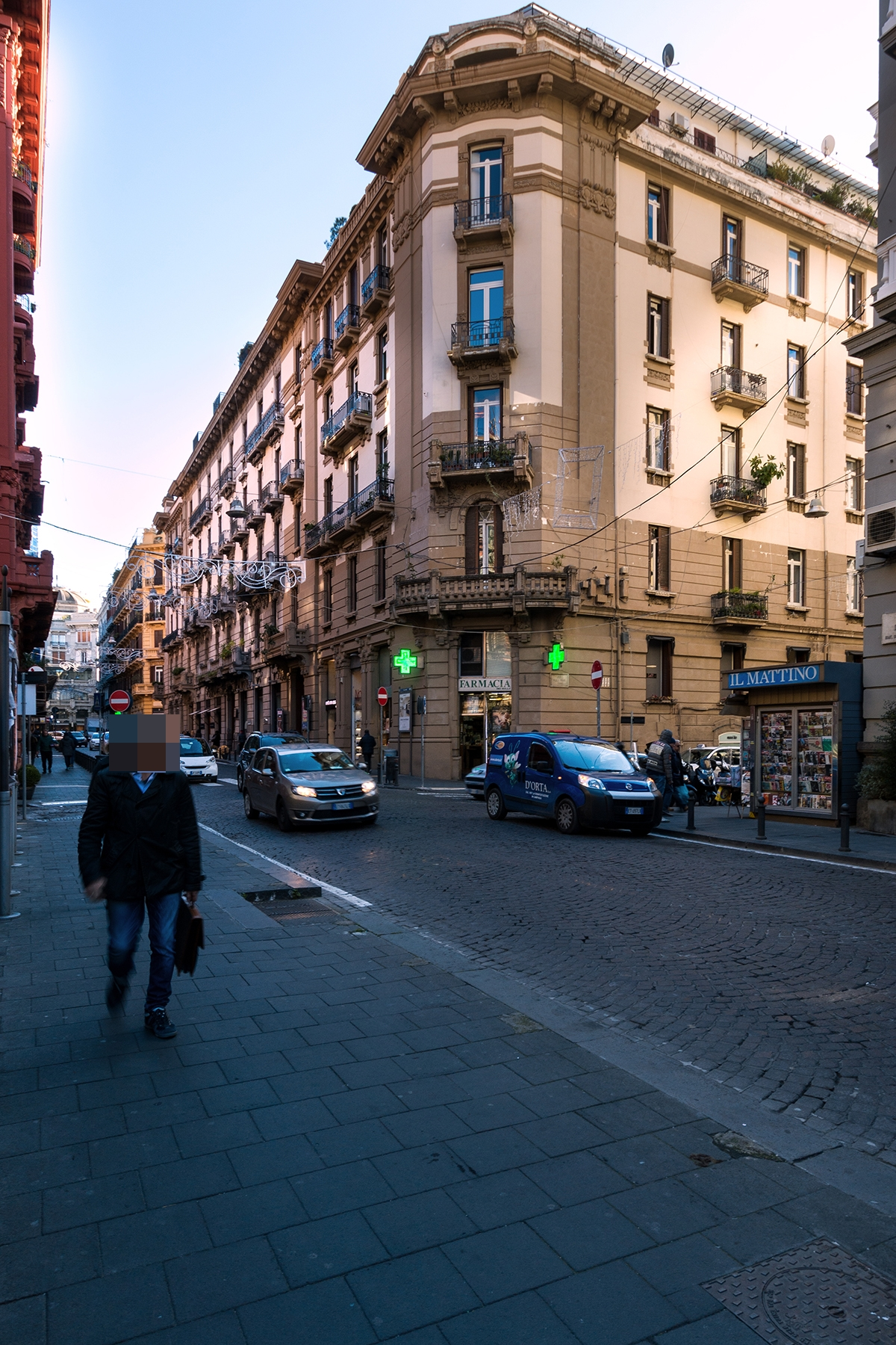 Edificio residenziale progettato da Giulio Ulisse Arata